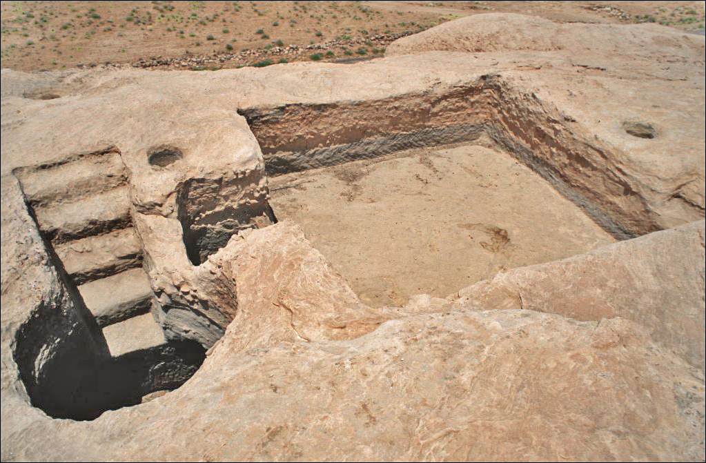 Un ensemble de presse à vin creusée dans le roc aux environs de Pétra.